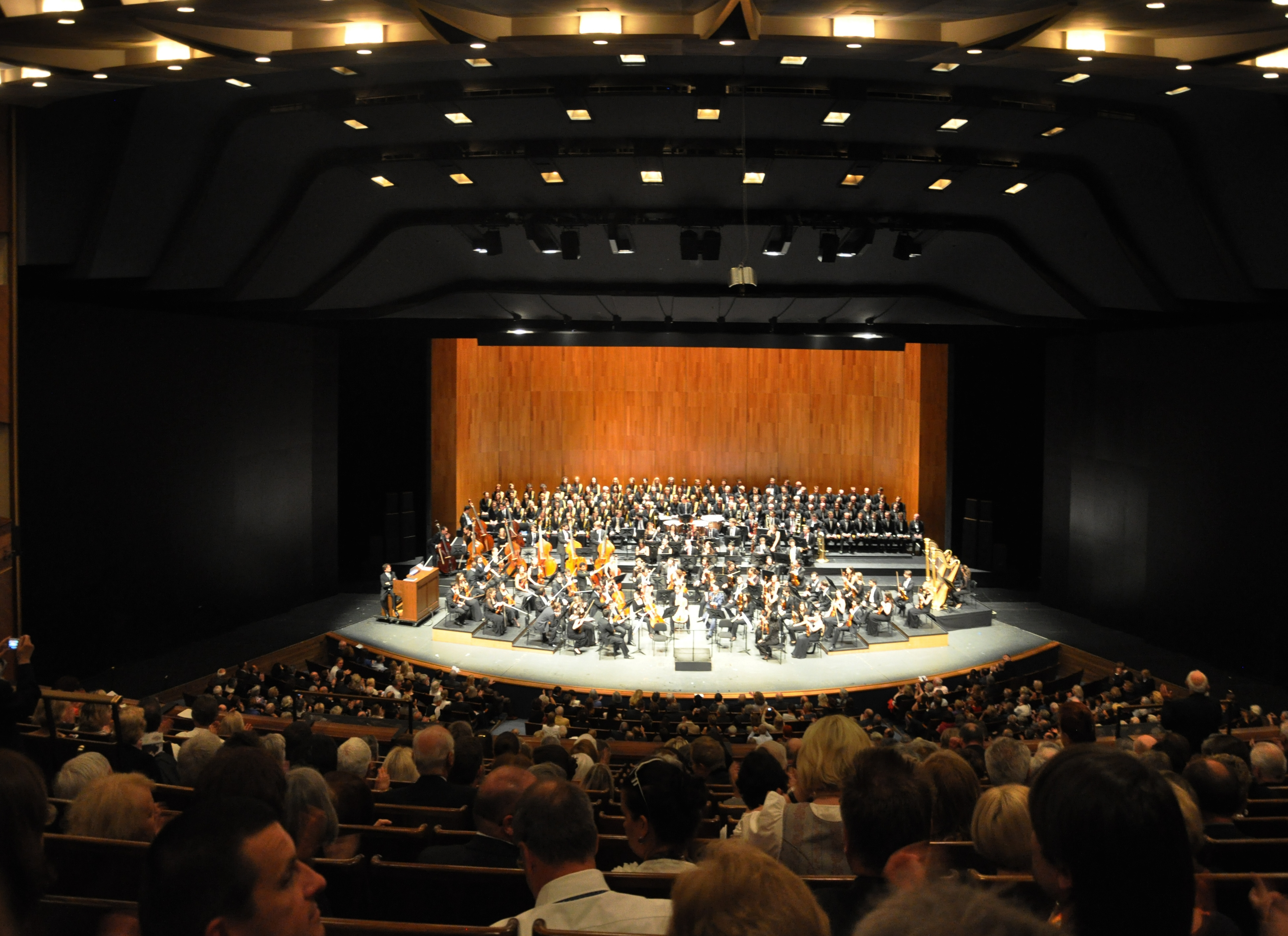 West-Eastern Divan Orchestra with the Wiener Singverein at Großes Festspielhaus Salzburg, 2013-05-20